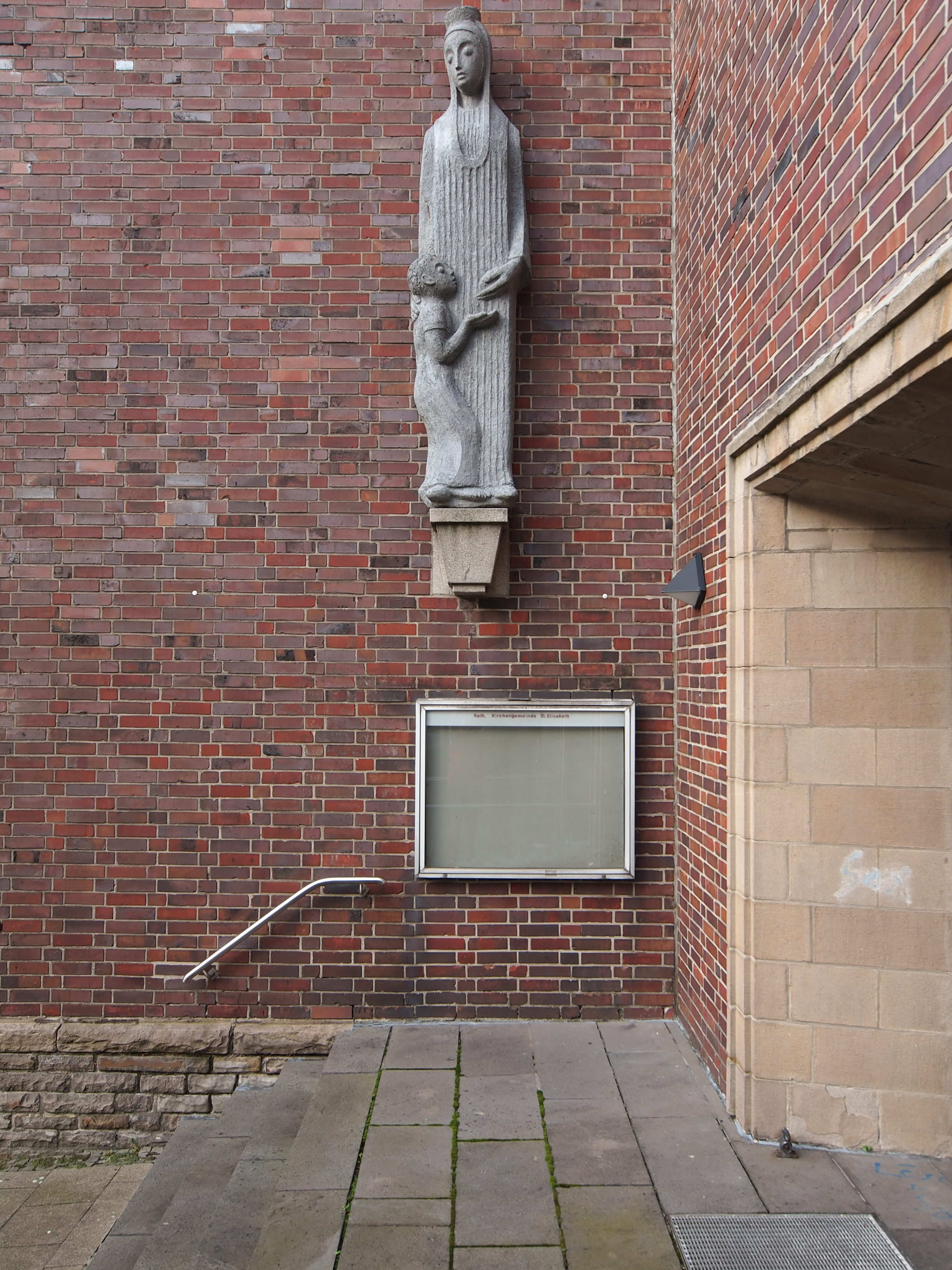 Die kath. Kirche St. Elisabeth in Herne, Brunnenstraße, Statue der Elisabeth